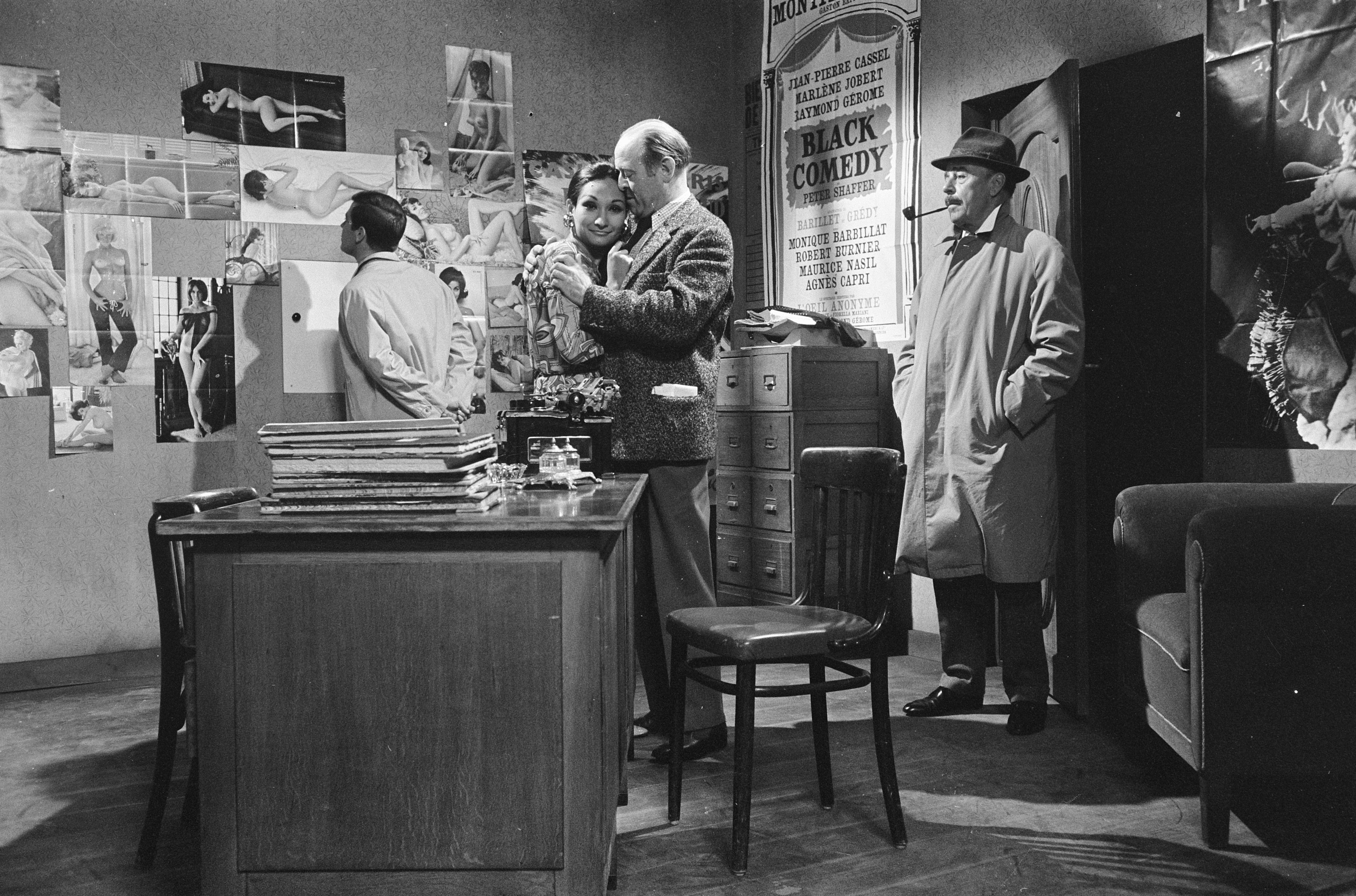 Collectie / Archief : Fotocollectie Anefo Reportage / Serie : Opnamen van de TV serie "De woede van Maigret" Beschrijving : Maigret (Jan Teulings, met pijp) staat de situatie in een nachtclub te observeren Datum : 19 september 1968 Trefwoorden : acteurs, groepsportretten, televisieopnamen Persoonsnaam : Farano, Ada, Teulings, Jan Fotograaf : Fotograaf Onbekend / Anefo Auteursrechthebbende : Nationaal Archief Materiaalsoort : Negatief (zwart/wit) Nummer archiefinventaris : bekijk toegang 2.24.01.05 Bestanddeelnummer : 921-6936